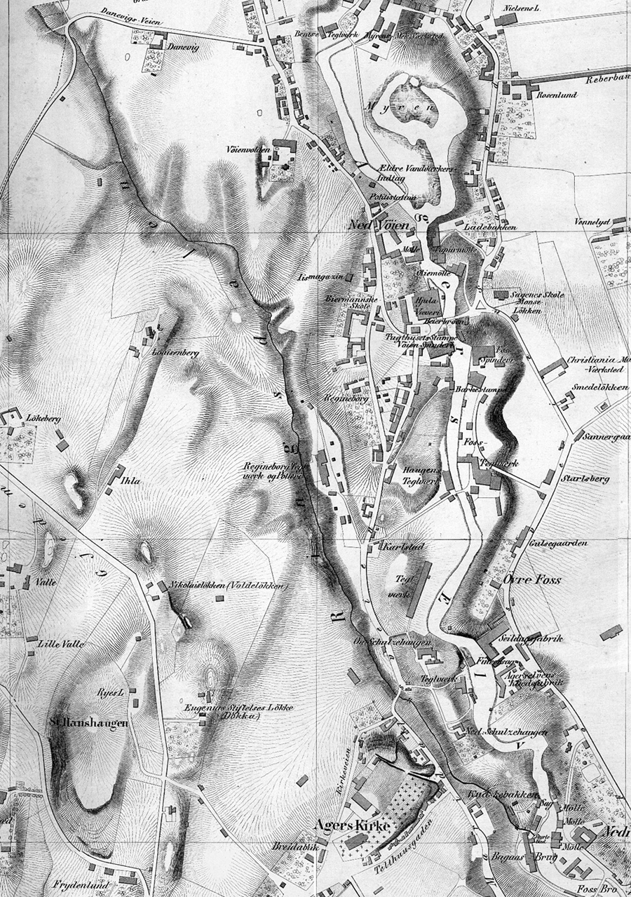 Kart over Ringsdalen, Kristiania, 1861.